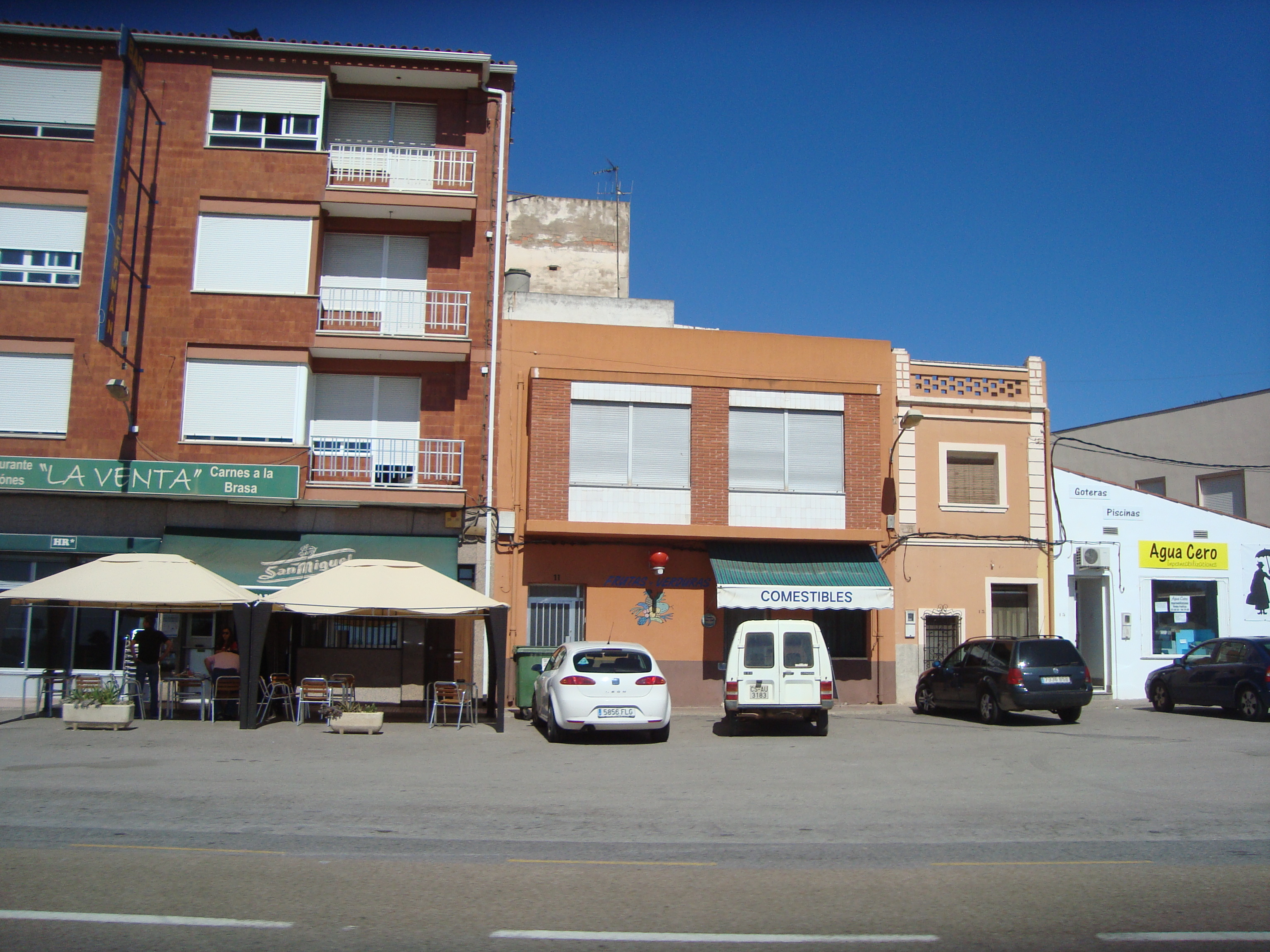 Venta de San Antonio, La Ribera de Cabanes, Castellón